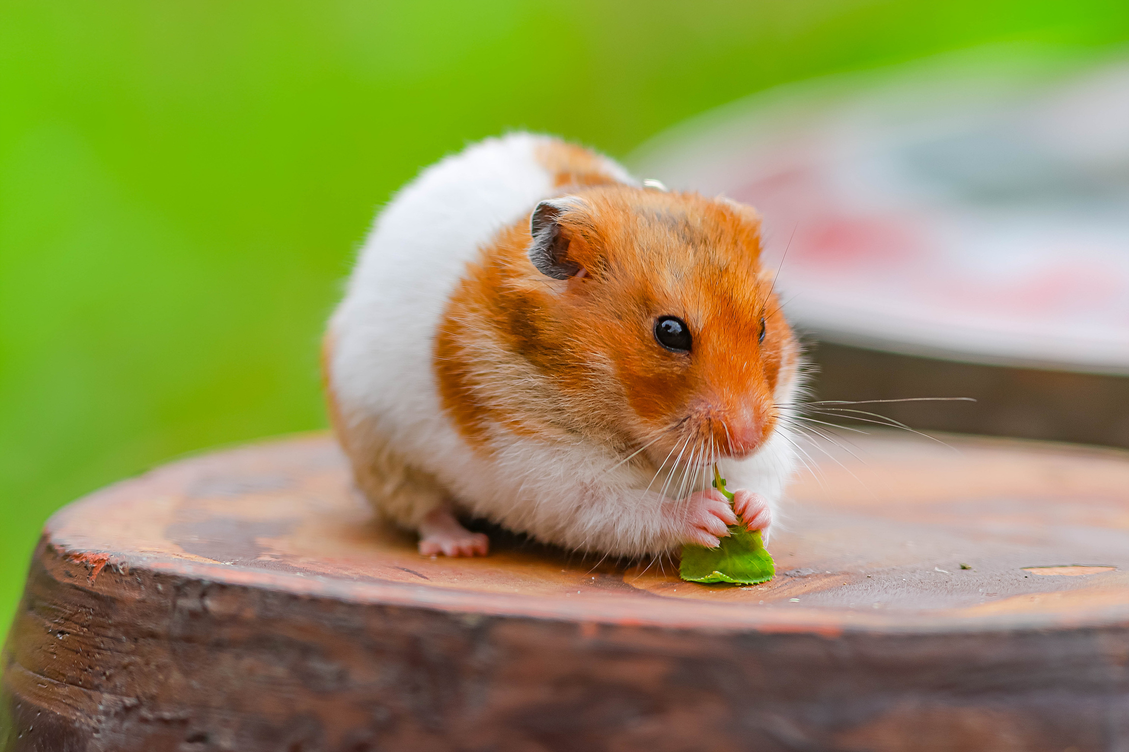 한국의 햄스터